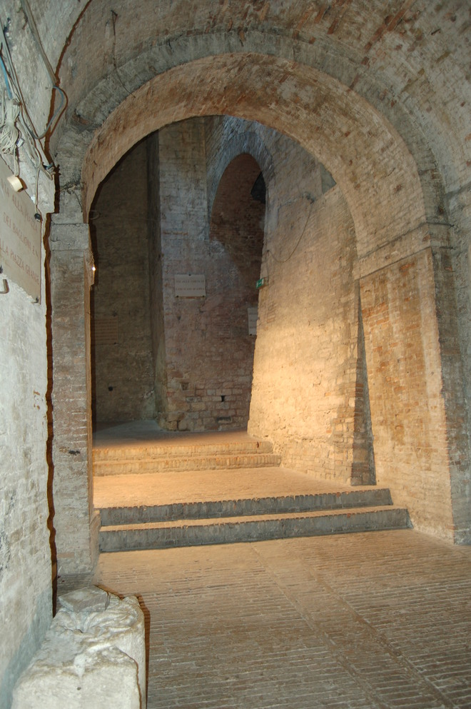 Perugia - Rocca Paolina